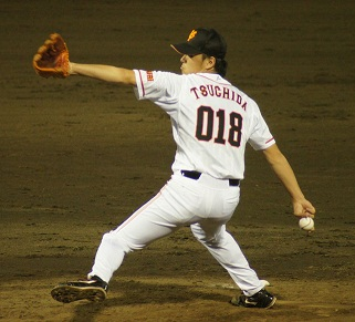 Giants_tsuchida_018